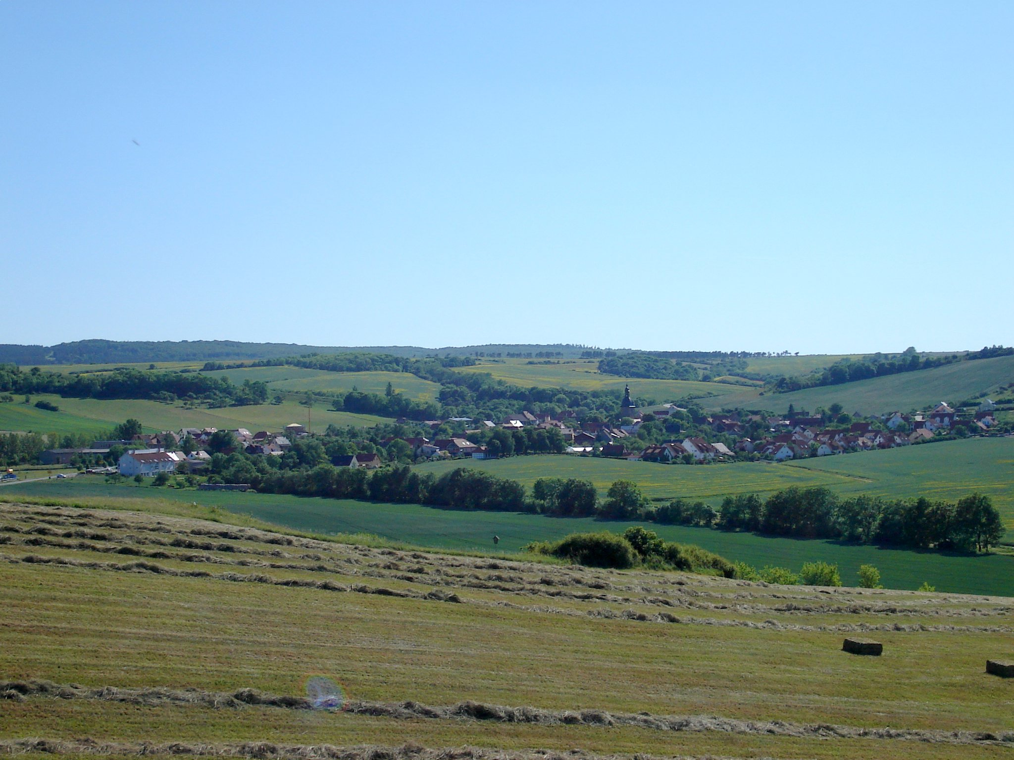 Holzhausen, Ortsteil der Wachsenburggemeinde im Ilm-Kreis